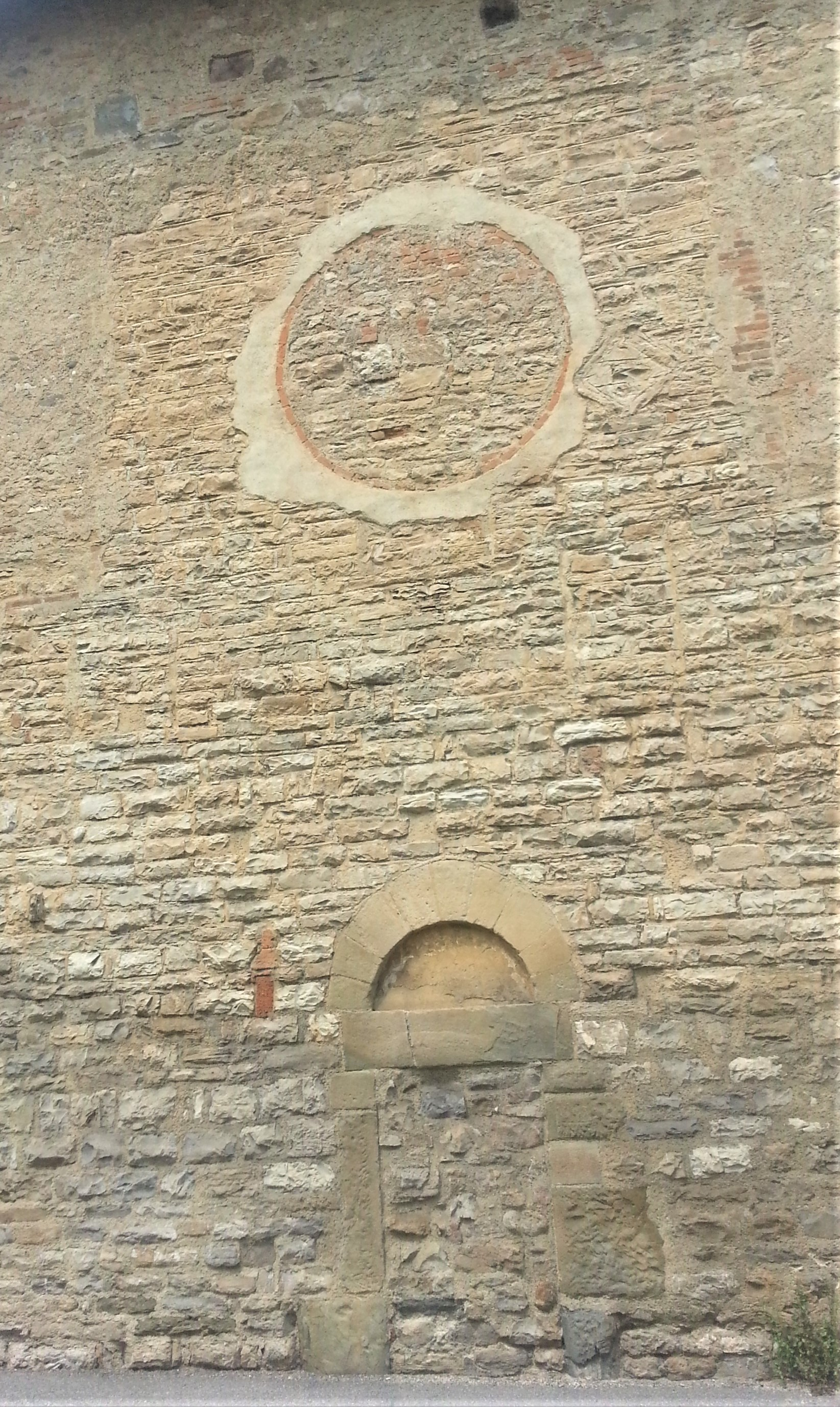 particolare lato sud